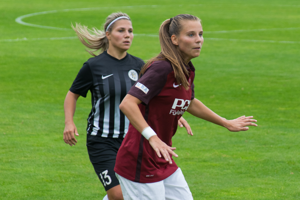 Kylie Strom vs Hradec Kralove, 10 September 2017